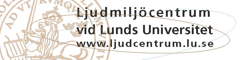 Ljudmiljöcentrums logotyp